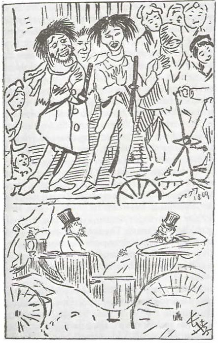 Bildbeschreibung: 1897 im Magazin Mezamashigusa veröffentlichter Cartoon Zeichner: oberes Panel: Ausschnitt aus einer Zeichnung von Charles Wirgman (1832–1891) in The Japan Punch vom 6. März 1869, Fortsetzung der Zeichnung s. [1] unteres Panel: Kōtarō Nagahara (長原孝太郎, 1864–1930) Datum: 1897